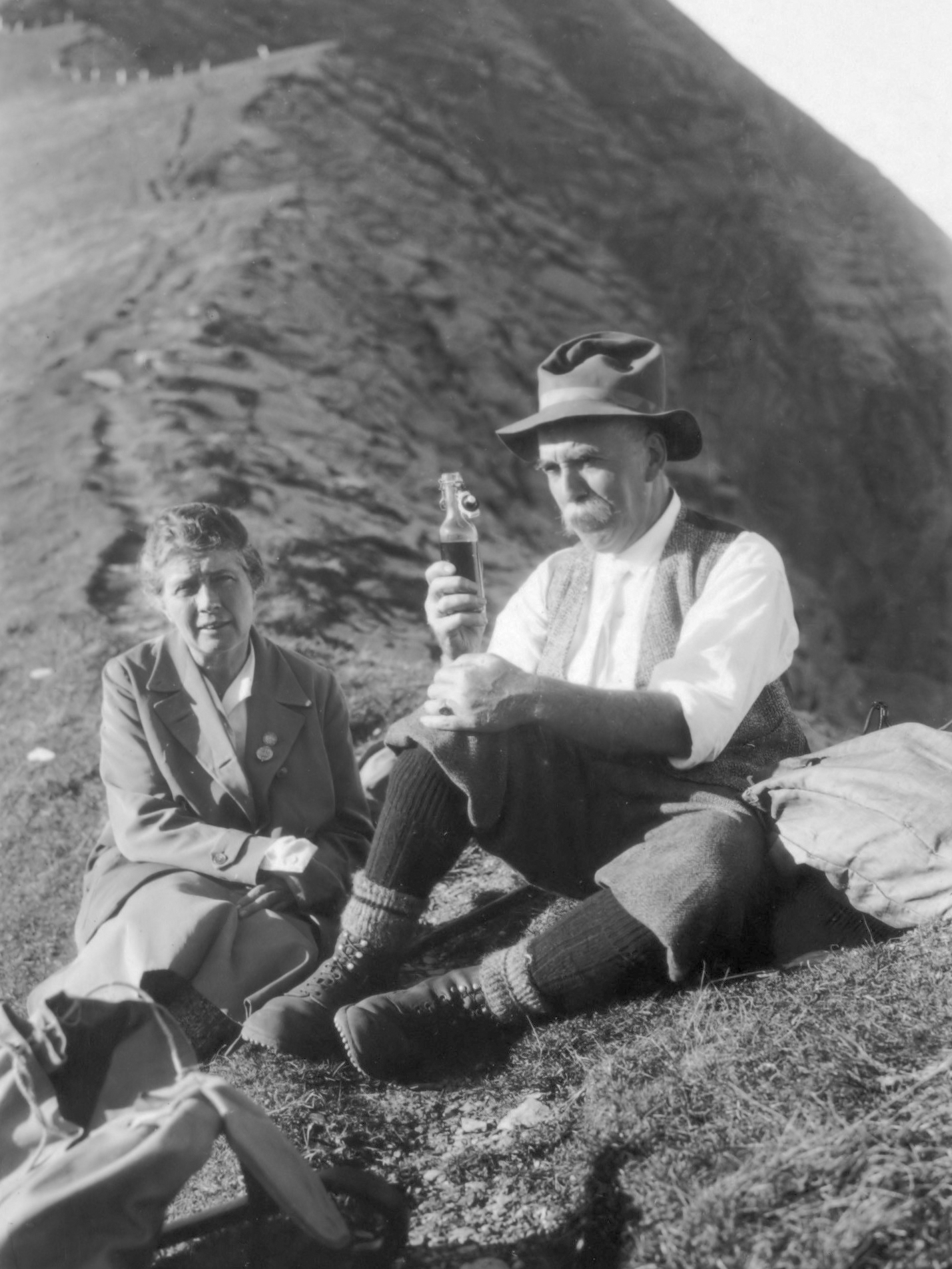 [DLC] Fotoalbum Visser: Nederlands-Indië, China, Japan, Nederland, Zwitserland, 1930. Albumblad met twee foto's van het echtpaar De Bruijn-van der Leeuw in Zwitserland*1931/01/01